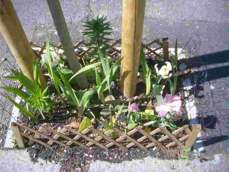 Bepflanztes Baumloch, London, Frühjahr 2013